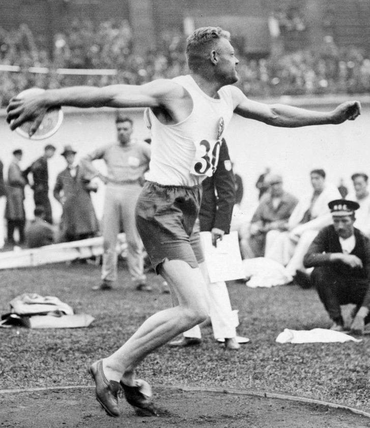 Olympische Spelen 1928 Amsterdam, Nederland. Atletiek. Discuswerpen, heren. De Nederlandse atleet Gerrit Eijsker werpt hier de discus 39,80 m. Hij haalde geen finaleplaats.